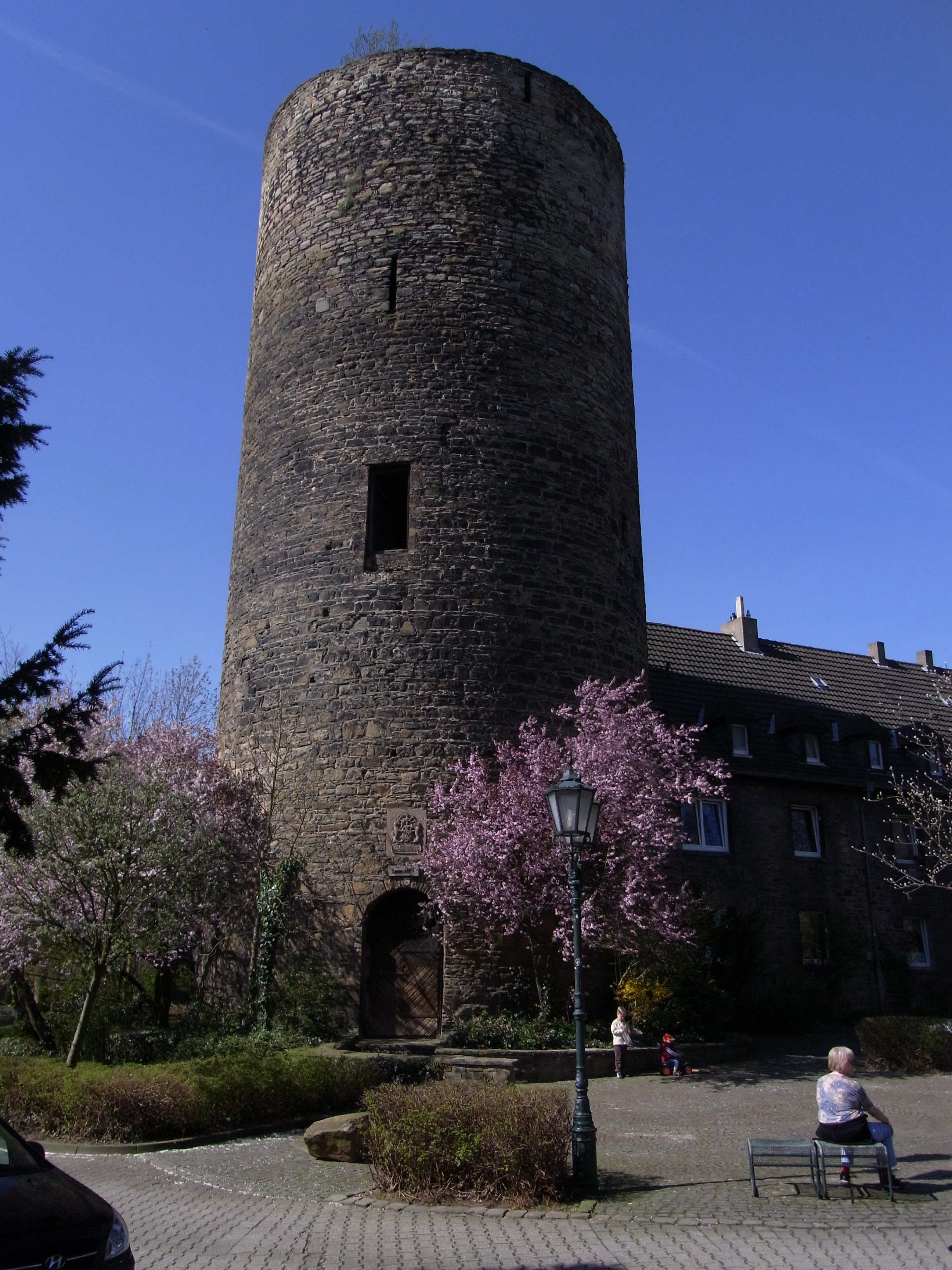 Burgturm der Burg Wetter